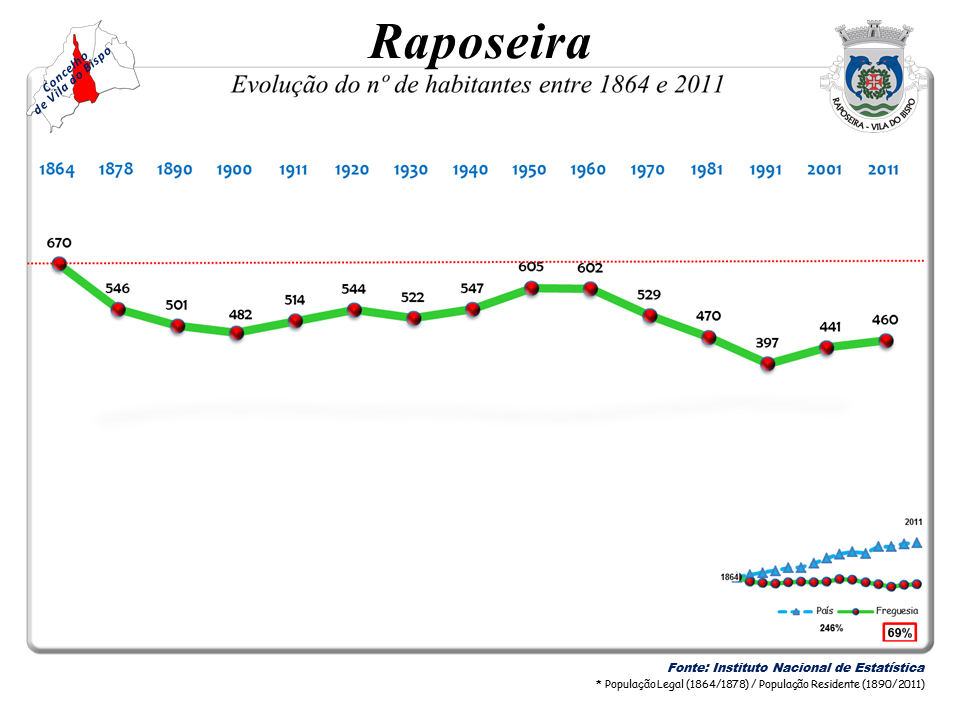 Censos 1864/2011